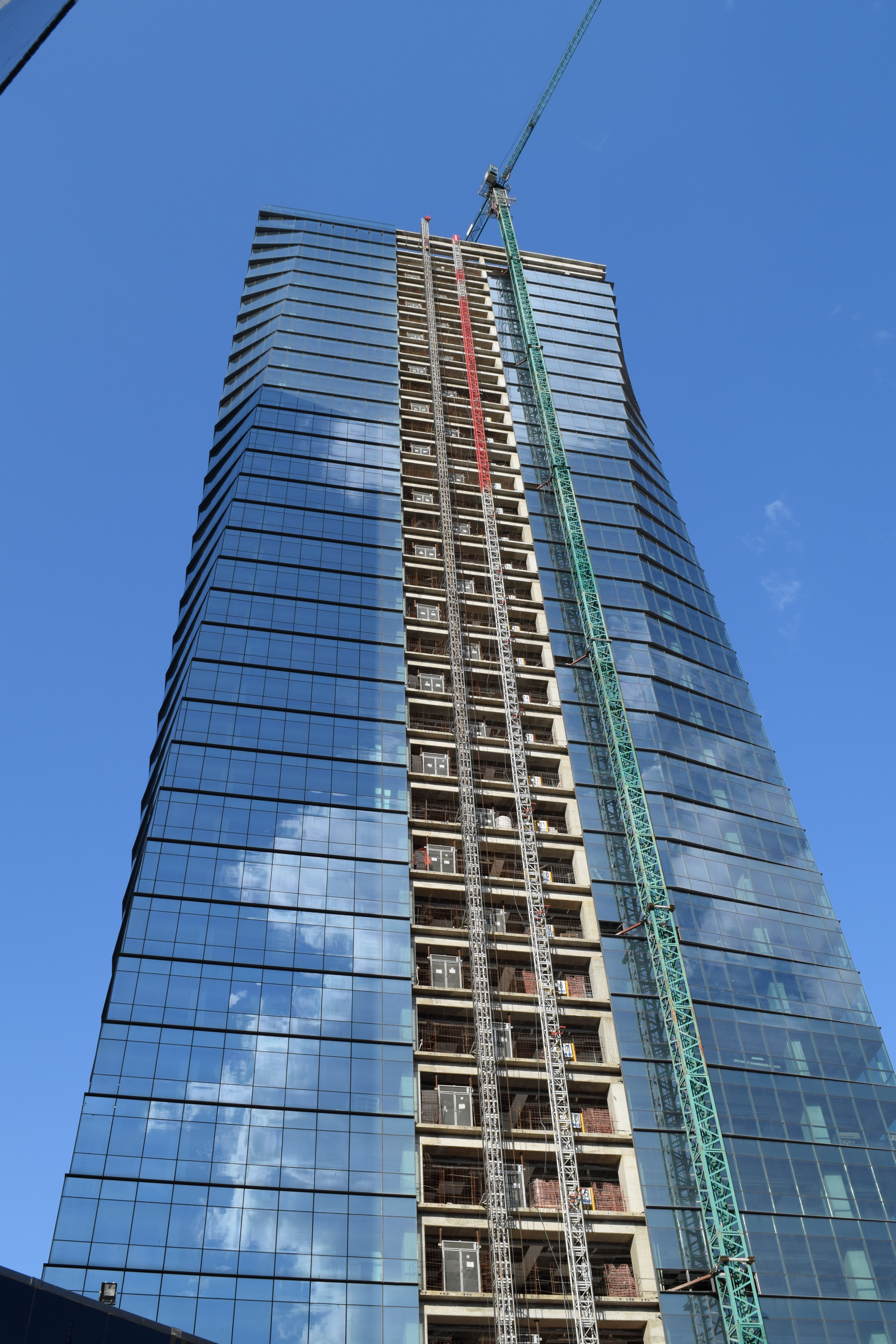 Torre del BBVA en Catalinas Norte, Buenos Aires; durante su construcción.